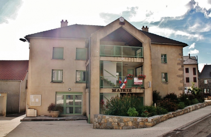 mairie du beage